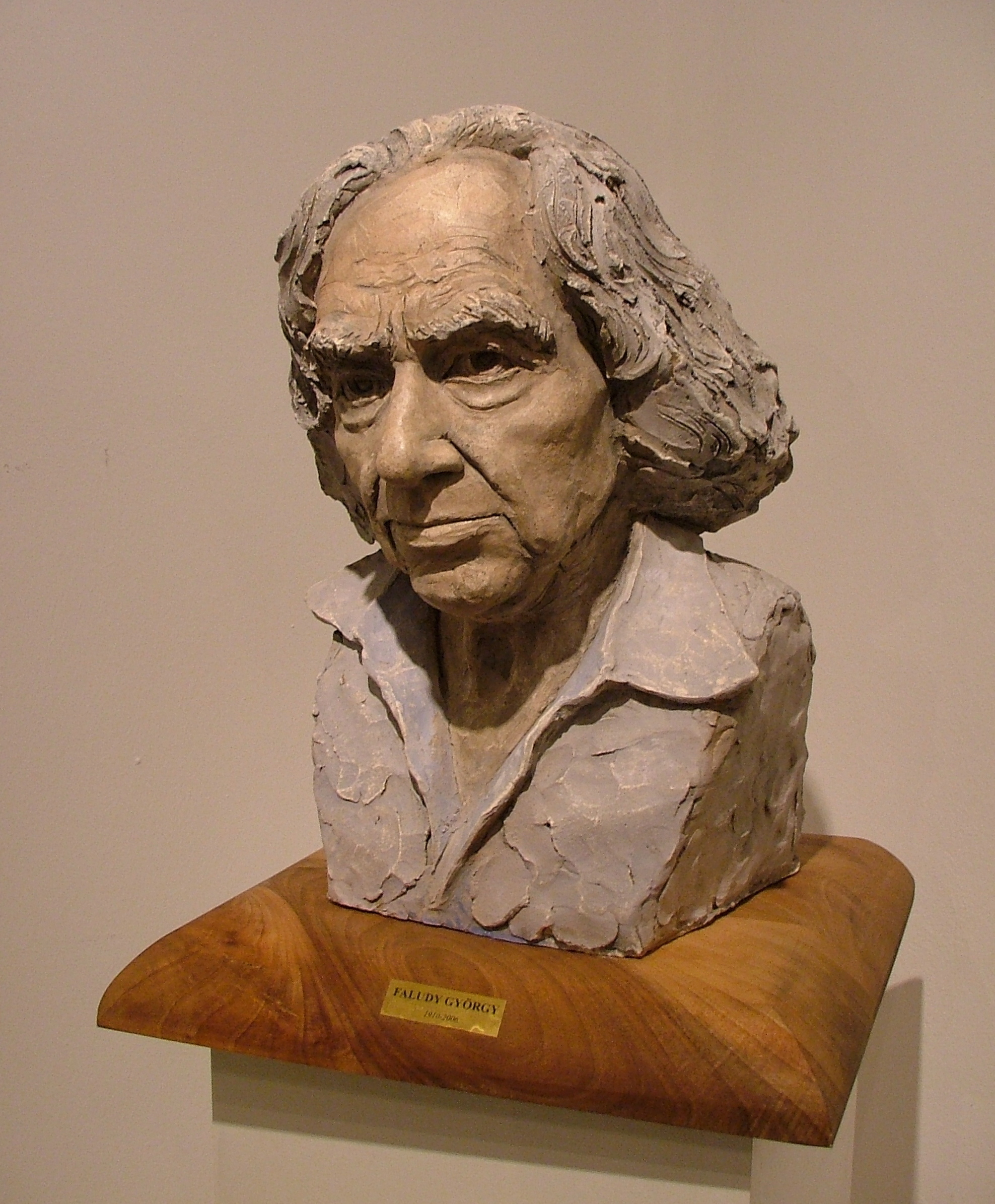 Juha Richárd: Faludy György (festett terrakottaszobor), Debrecen